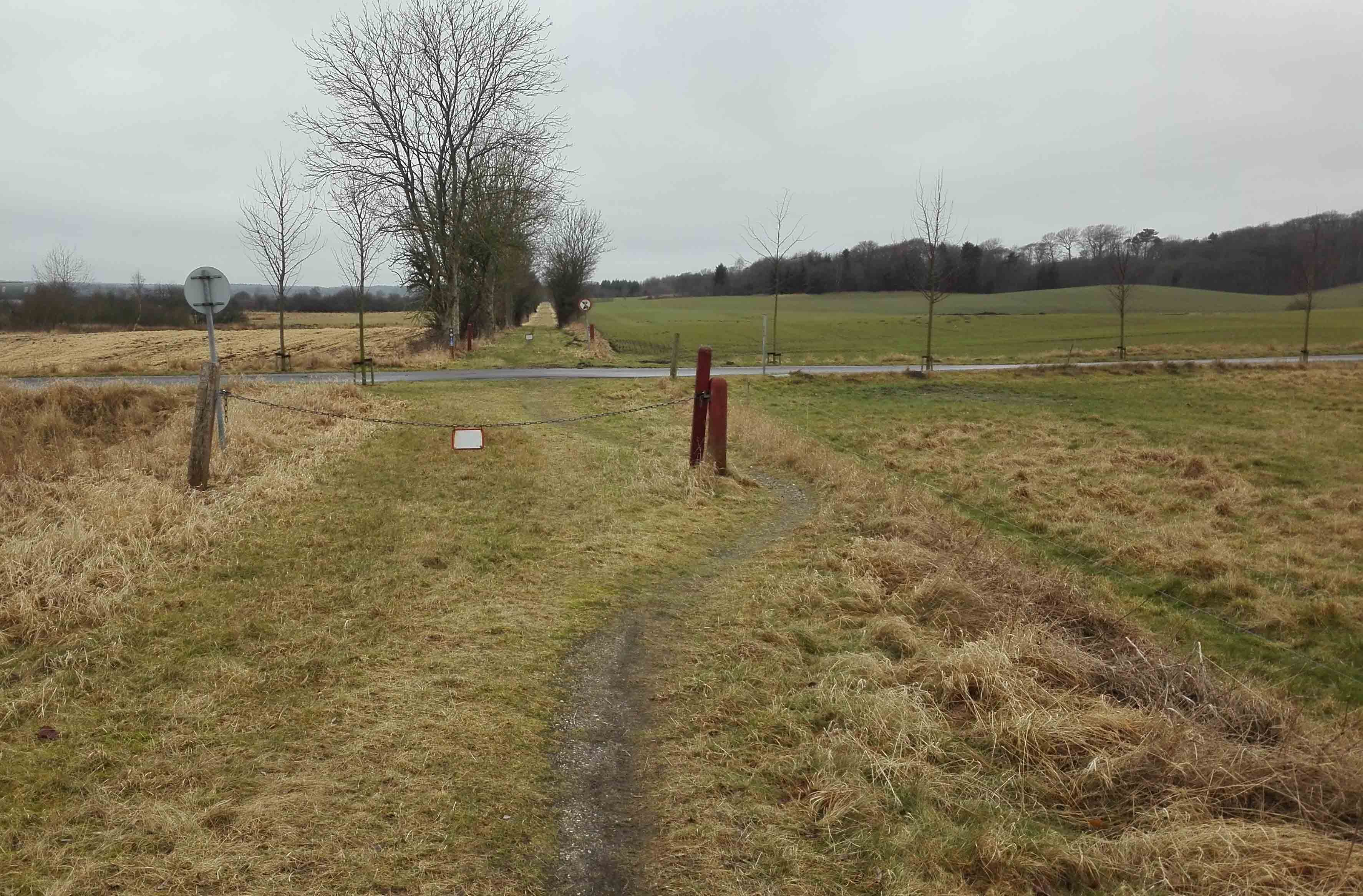 Randers-Hadsund Jernbanes tracé vider sig ud, hvor Trudsholm trinbræt lå, og krydser Trudsholm Alle